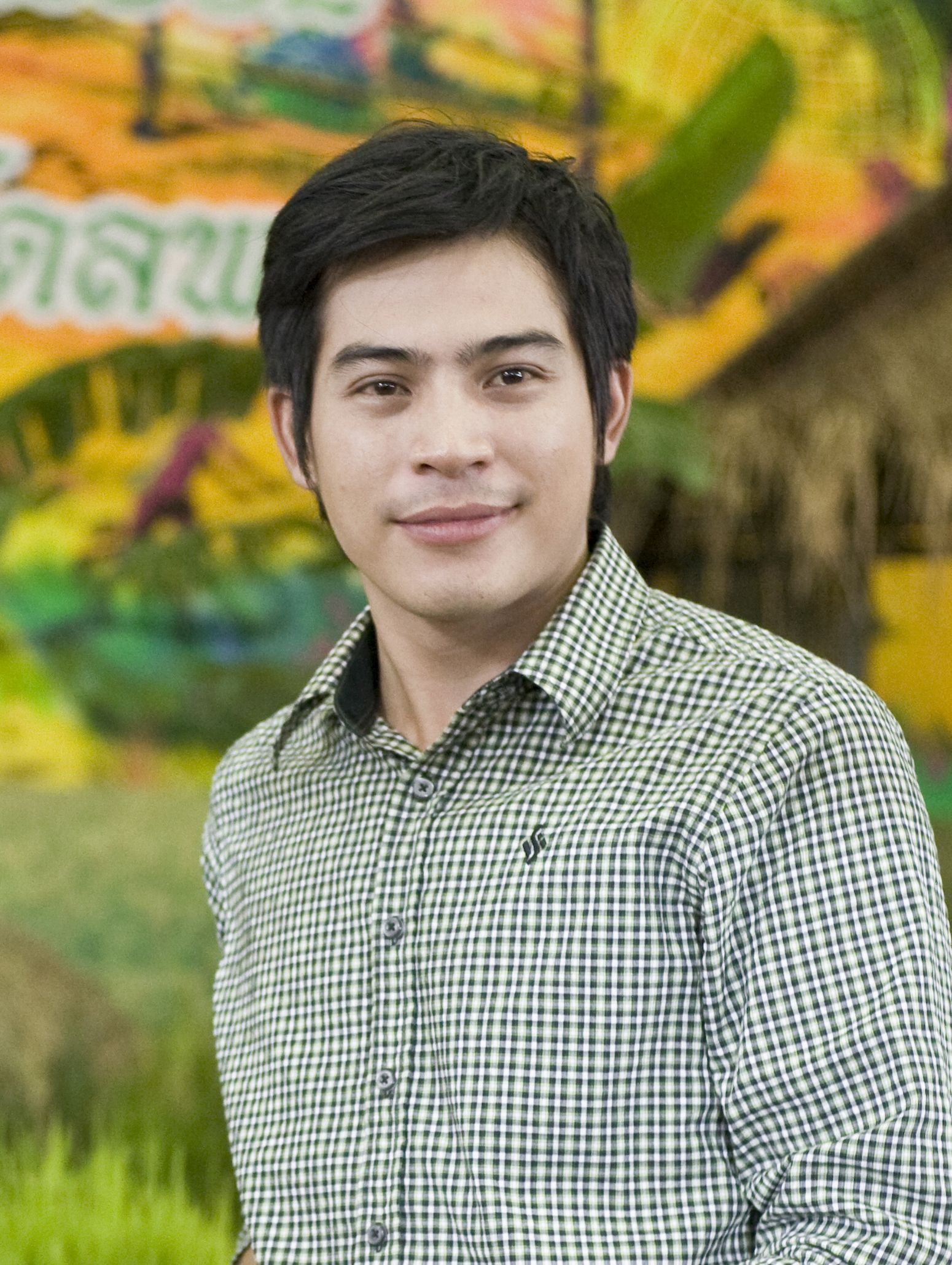 ทฤษฎี สหวงษ์ (ปอ) - ผู้ใหญ่ลีกับนางมา / นายกรัฐมนตรีบันทึกเทปรายการ “เชื่อมั่นประเทศไทยกับนายกฯ อภิสิทธิ์” ณ อาคารศูนย์ฝึกอาชีพเทศบาลตำบลท่าวุ้ง จังหวัดลพบุรี 12กันยายน2552 (The Official Site of The Prime Minister of Thailand Photo by พีรพัฒน์ วิมลรังครัตน์)